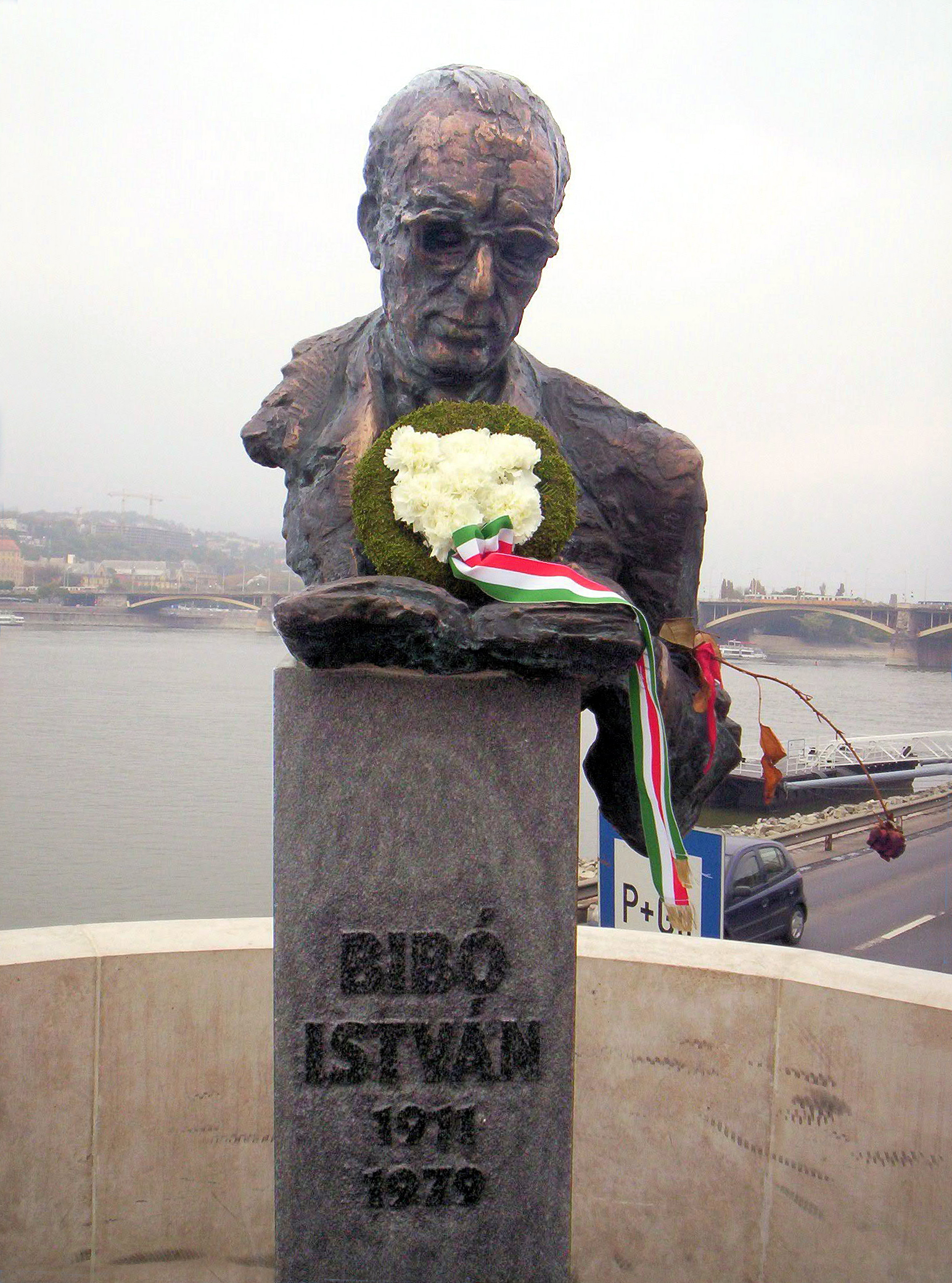 Bibó István szobra Budapesten. Széri-Varga Géza alkotása (2005) – photo taken by the uploader 2005